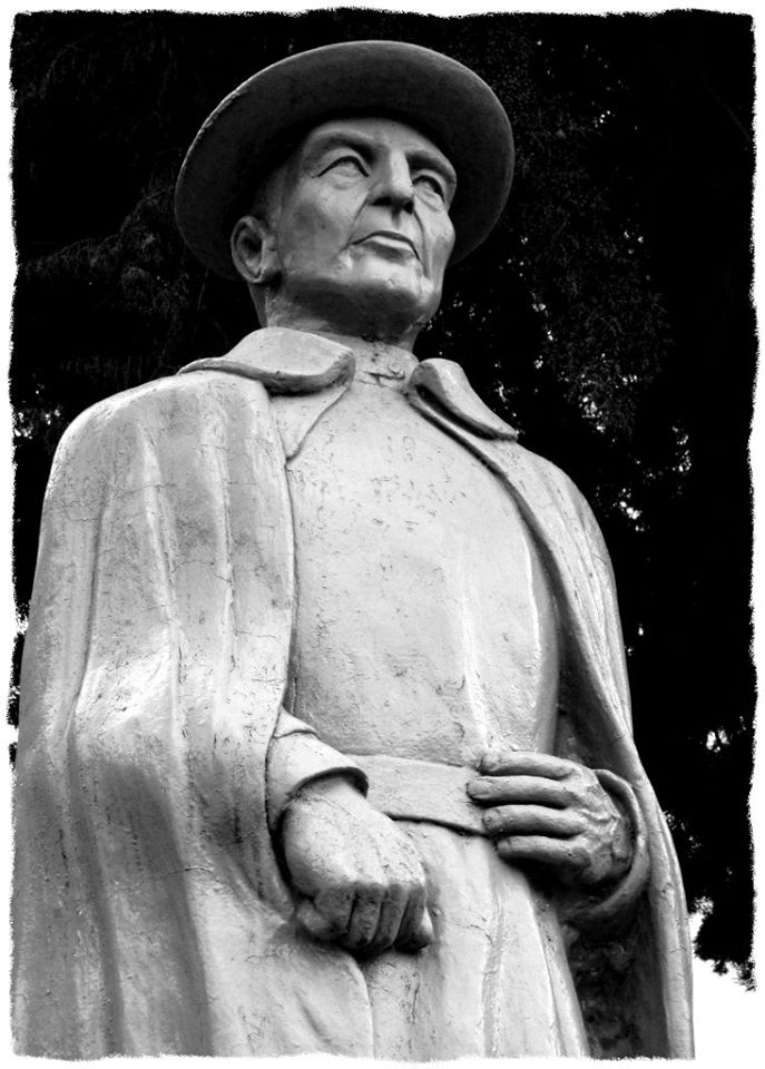 Sacerdote católico boliviano de la región valluna. Fotografía tomada por Javier Siles Balladares en 2013.